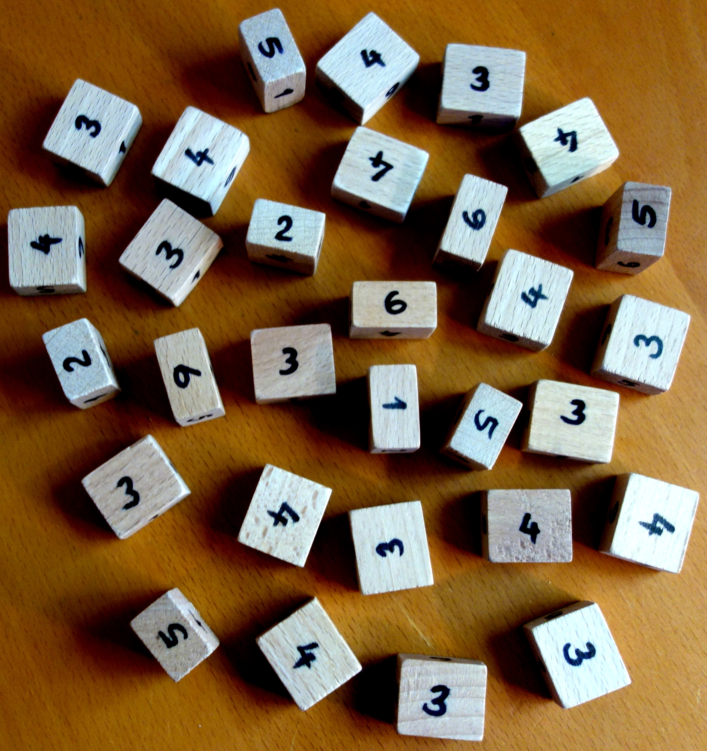 Riemerquader